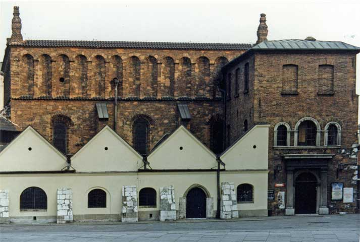 Foto gemaakt in de derde week van augustus 1993 (gedigitaliseerd 16 november 2006).